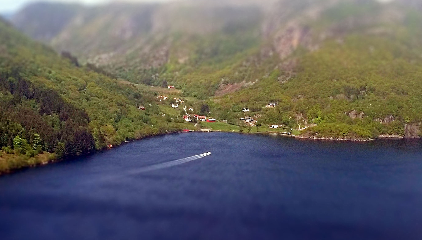 Listeid ved Framvaren. Sett fra Runefjellet i Herad.